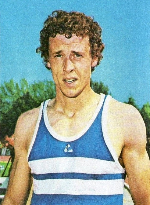 CAMPIONI dello SPORT 1973/74-Figurina n.33- DRUT -ATLETICA LEGGERA-Rec